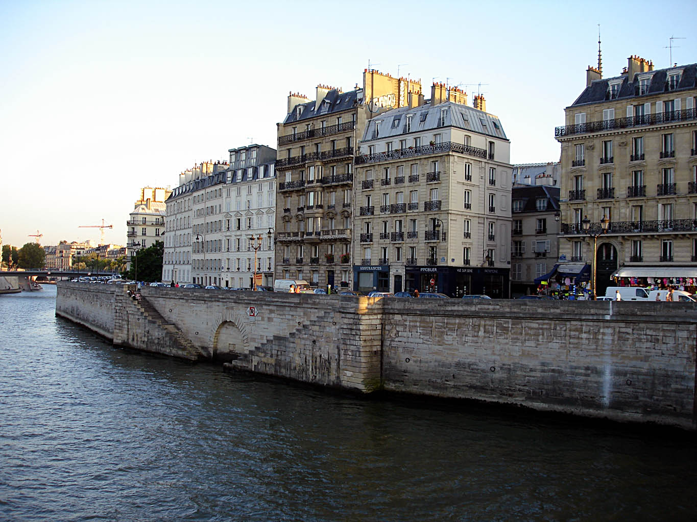 Le quai aux Fleurs, Paris (France)